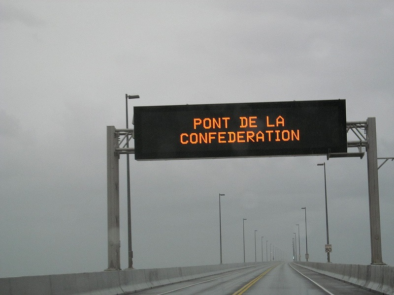 Panneau routier lumineux au-dessus du pont de la Confédération reliant le Nouveau-Brunswick à l'île du Prince-Edouard.